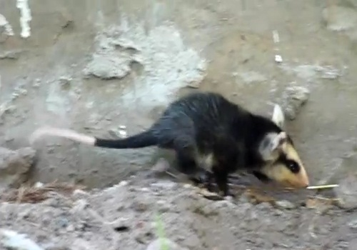 La zarigueya bebé